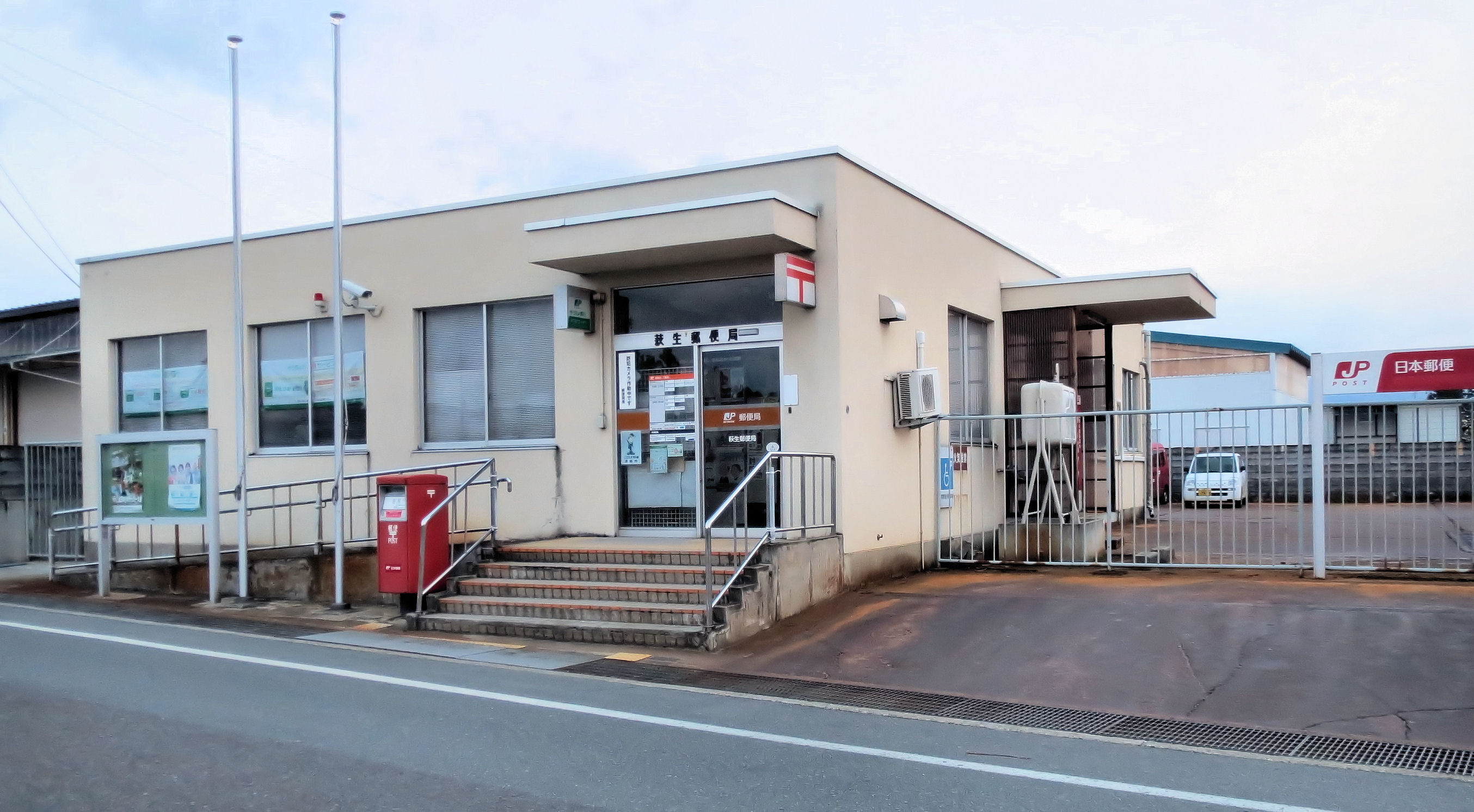 萩生郵便局（山形県西置賜郡飯豊町）